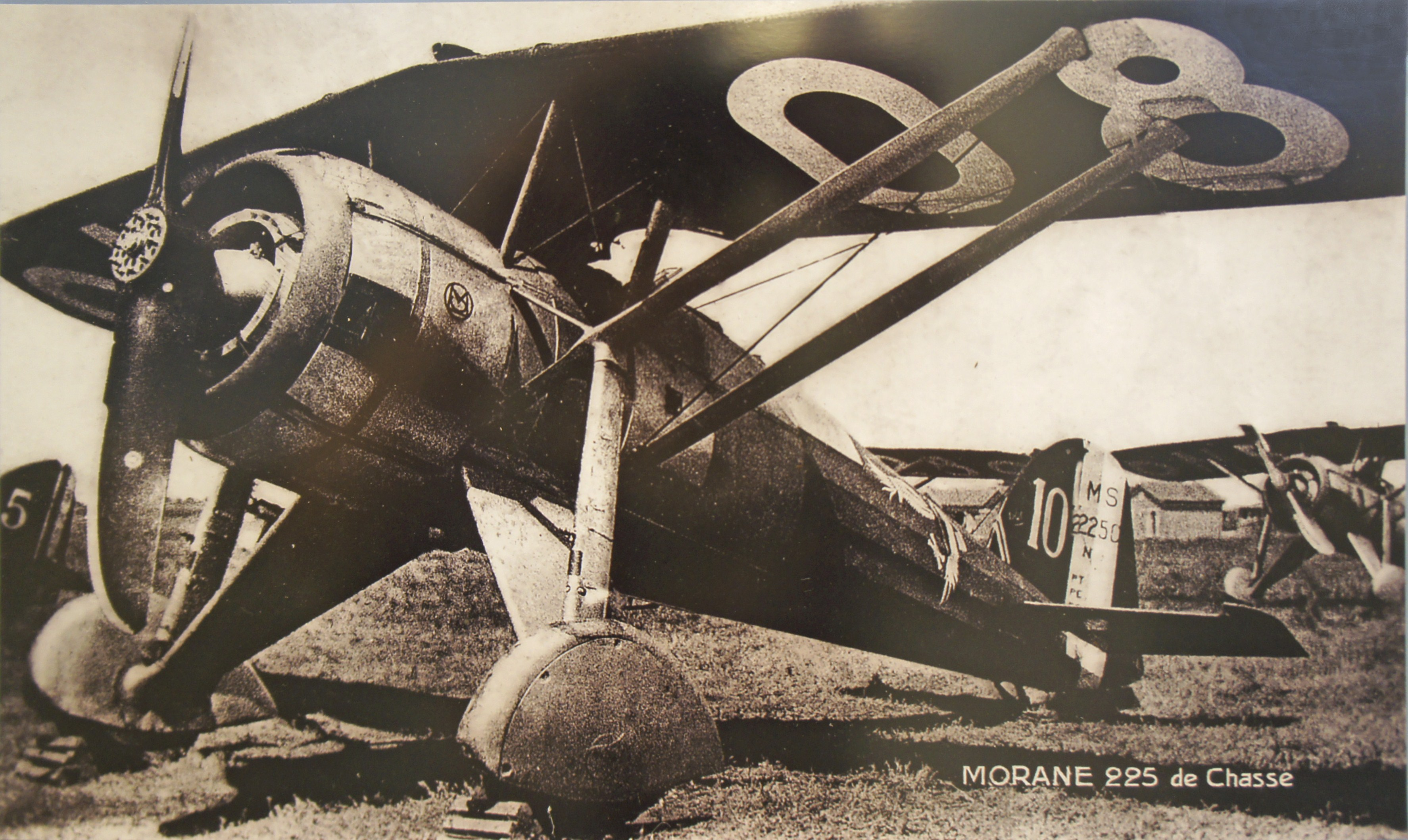 Morane_Saulnier 225 de la SPA 153 sur la BA112 .